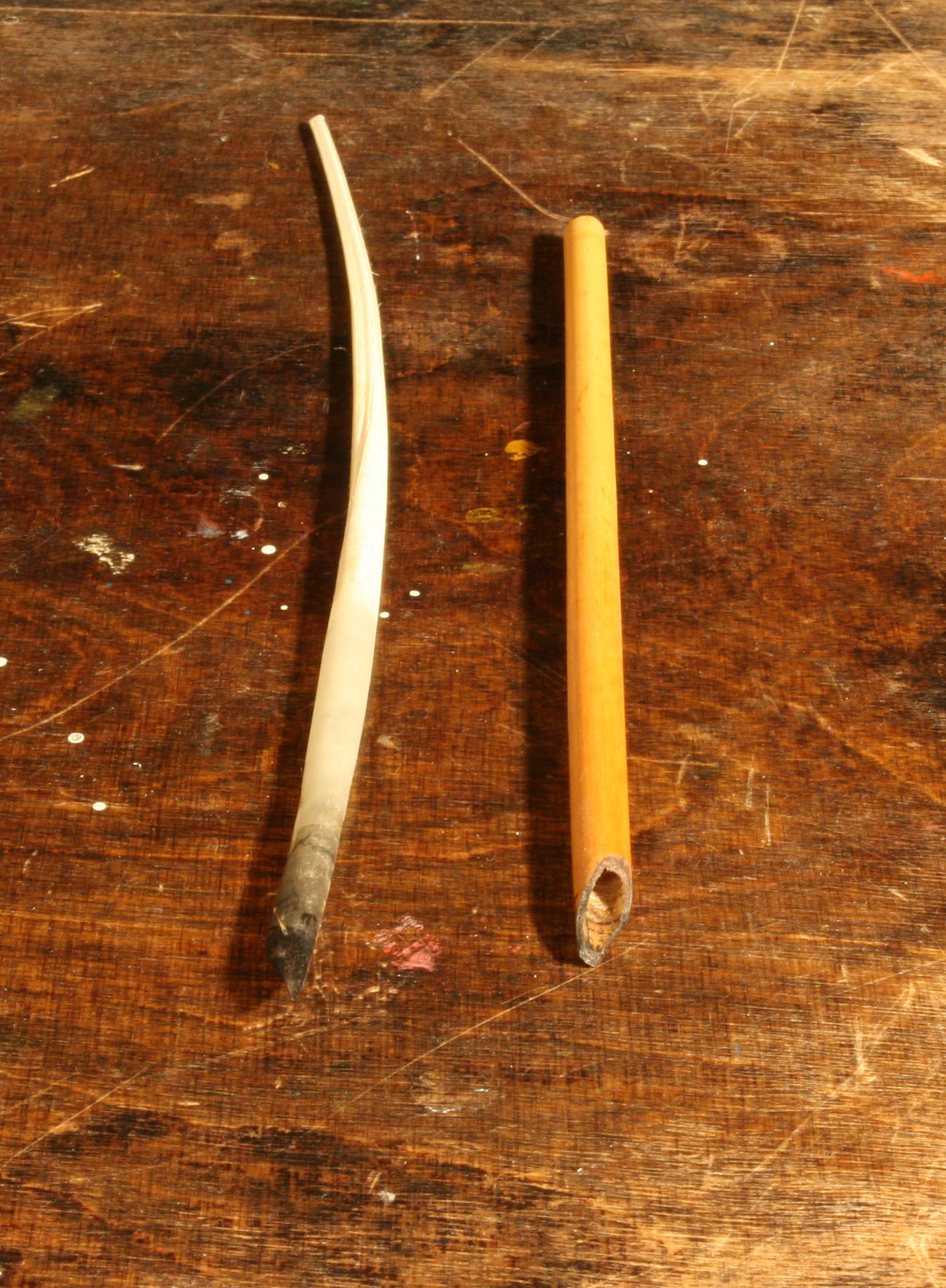 En fjerpen med afskårne stråler og en pen lavet af tagrør